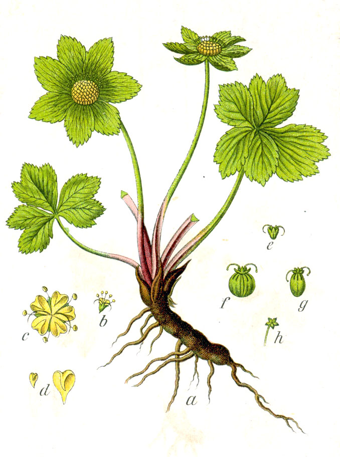 Hacquetia epipactis (Scop.) DC. Original Caption Hacquetie, Hacquetia epipactis